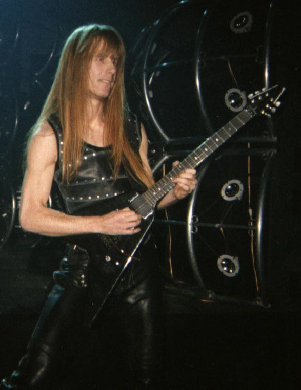 Карл Логан, гитарист рок-группы Manowar